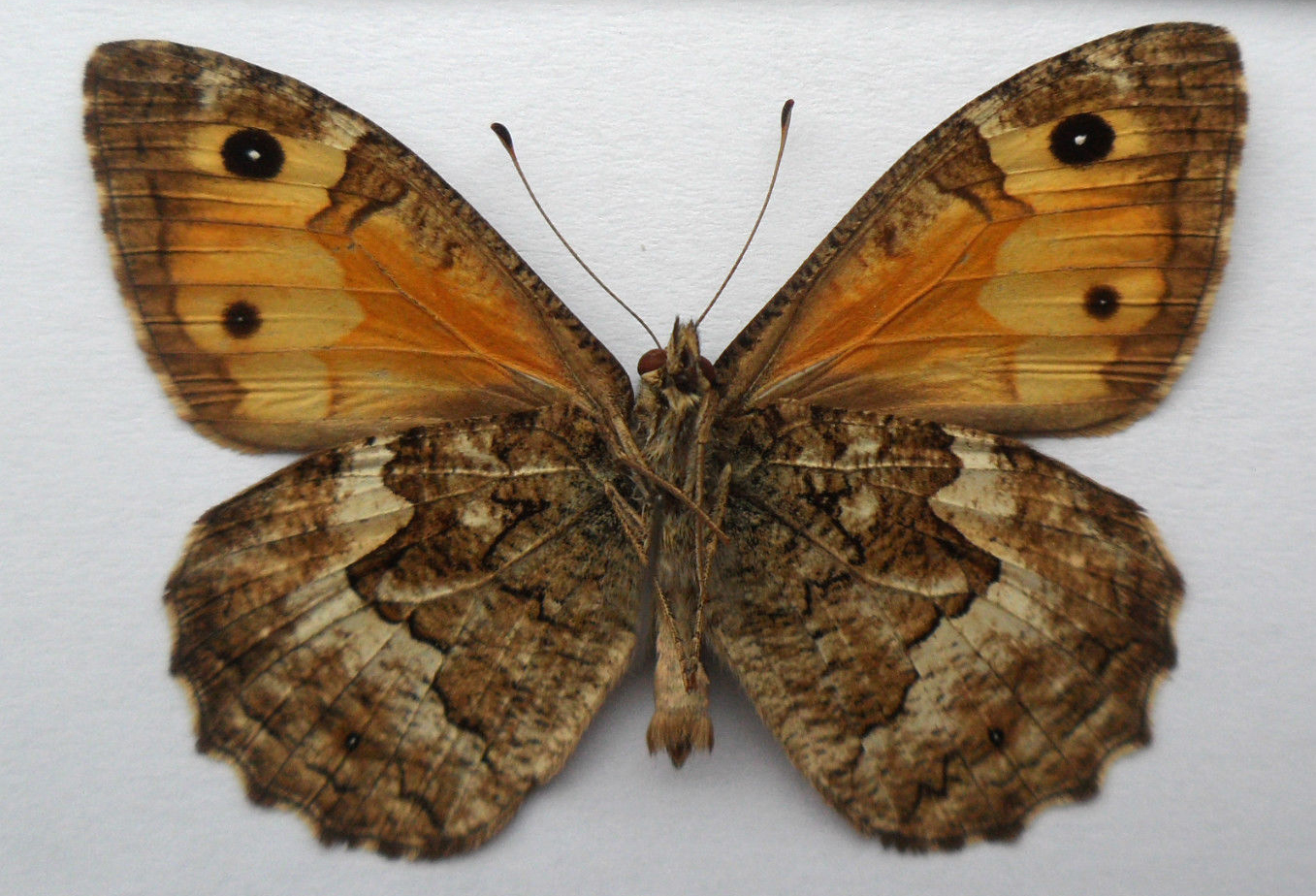 Hipparchia pellucida. самец, нижняя сторона крыльев. Крым, Судак